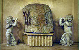 Reggio Calabria, pezzo di colonna del prodigio di San Paolo custodita presso il Duomo